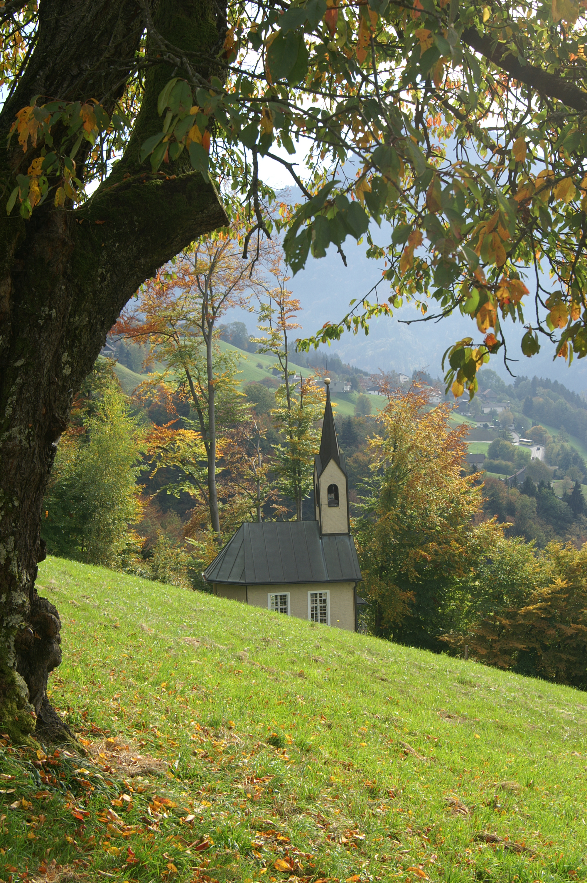 aus dem DEHIO Vorarlberg 1983: KAPELLE Maria vom Siege in Romberg. Um 1870 erbaut. Blick vom Romberg auf die Bödelestrasse zum Häfenberg in Dornbirn, Oberdorf.